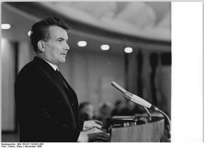 Zentralbild Franke 14.11.1966 Die 1. Jahreskonferenz des Deutschen Schriftstellerverbandes fand in der Zeit vom 2.11. - 4.11.66 in der Kongreßhalle am Berliner Alexanderplatz statt. 350 Teilnehmer der Konferenz (Schriftsteller, junge Autoren, schreibende Arbeiter, Literaturwissenschaftler und Bibliothekare) berieten über die Entwicklung der sozialistischen deutschen Nationalliteratur. UBz: Horst Salomon während seines Diskussionsbeitrages.